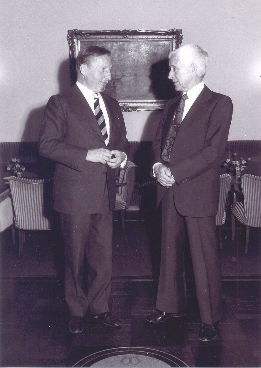 Ernst Klett der Jüngere und Ernst Jünger in den 80er Jahren.